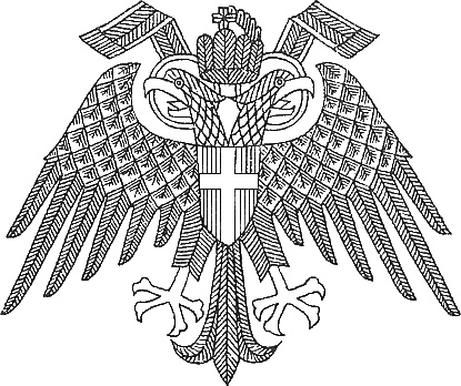 Wappen der Stadt Wien 1438-1945